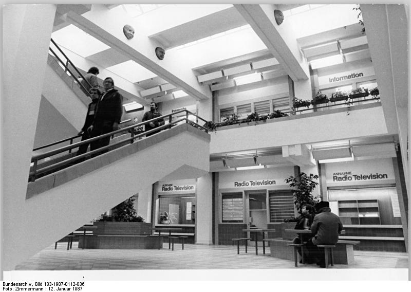 Berlin, "Haus der Dienste", Treppenhaus, Serviceschalter ADN-ZB Zimmermann 12.1.87-nin-Berlin: Haus der Dienste - Ein Haus der Dienste öffnete in Berlin-Marzahn an der Marzahner Promenade 17 nahe Hauptpostamt und S-Bahnhof seine Pforten. Das Haus wurde als dritten Objekt des künftigen gesellschaftlichen Zentrums von Marzahn fertiggestellt und ist die erste Einrichtung dieser Art in Berlin. In zwei Etagen befinden sich Annahmestellen mit Werkstatt für Uhren, Haushaltsgeräte, Rundfunk und Fernsehen, Lederbekleidung, Schuh-, Sattler- und Täschnerwaren. Weiter sind dort eine Komplexannahmestelle des Dienstleistungsbetriebes Berlin, eine chemische Schnellreinigung sowie eine Annahmestelle für Anzeigen und Zeitungsinserate in der auch Informationen über weitere Dienstleistungen erteilt wurden, eingerichtet. - Siehe auch Motiv 1987-0112-35N